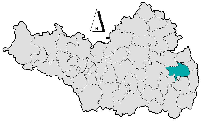 Maßstabsgetreues Schema der Lage der Gemeinde Erolzheim im Landkreis Biberach.